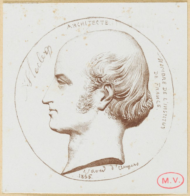 Der französische Architekt Achille Leclère (1785-1853)